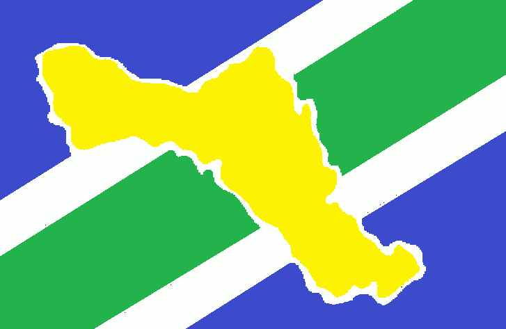 Bandeira do município de Laranjal do Jari.